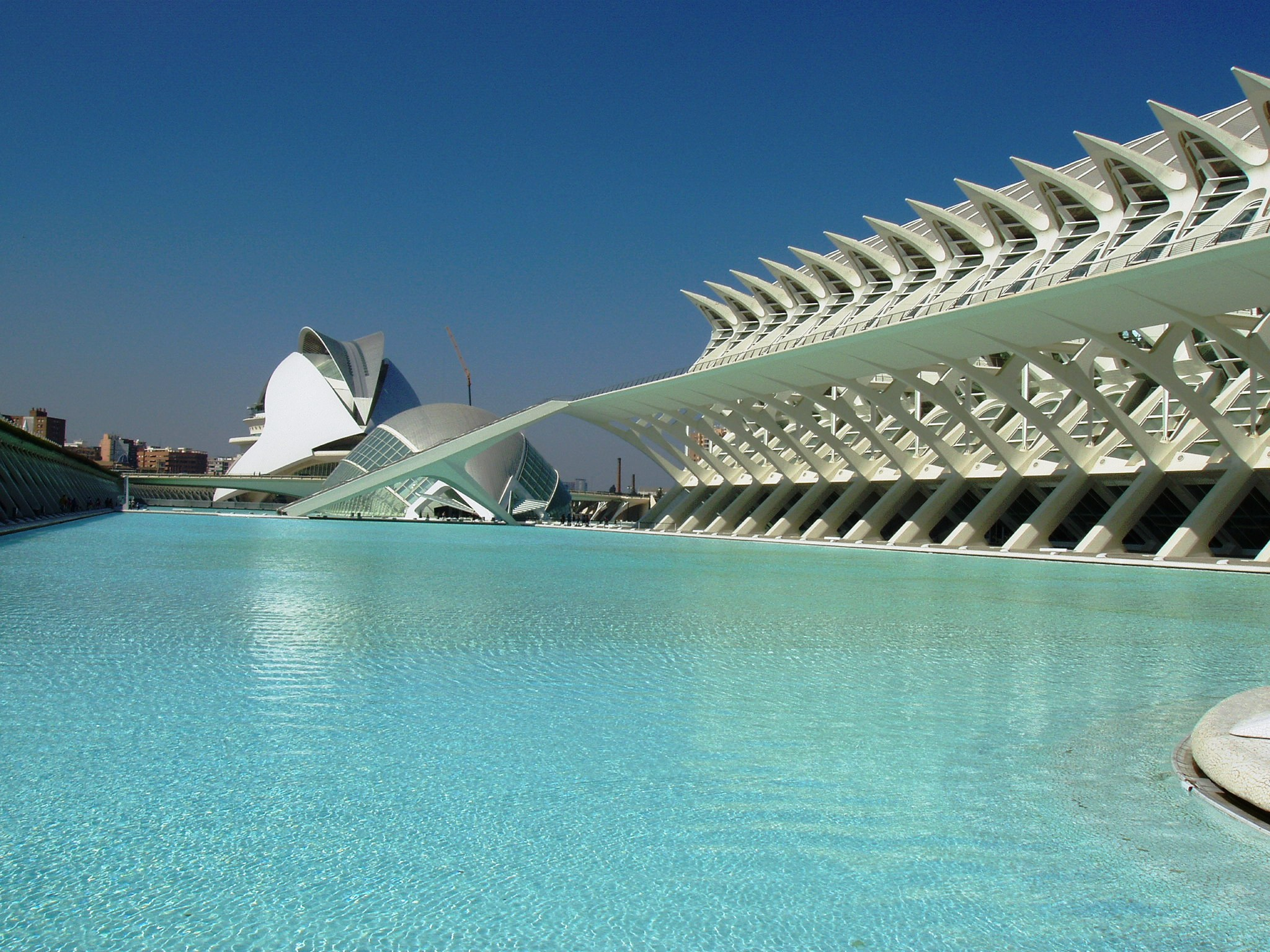 Ciudad de las Artes y de las Ciencias in Valencia; ganz hinten die Oper, davor L'Hemisfèric, rechts das Wissenschaftsmuseum